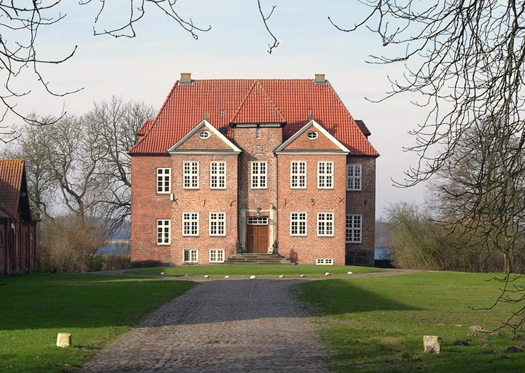 Gut Wahlsdorf